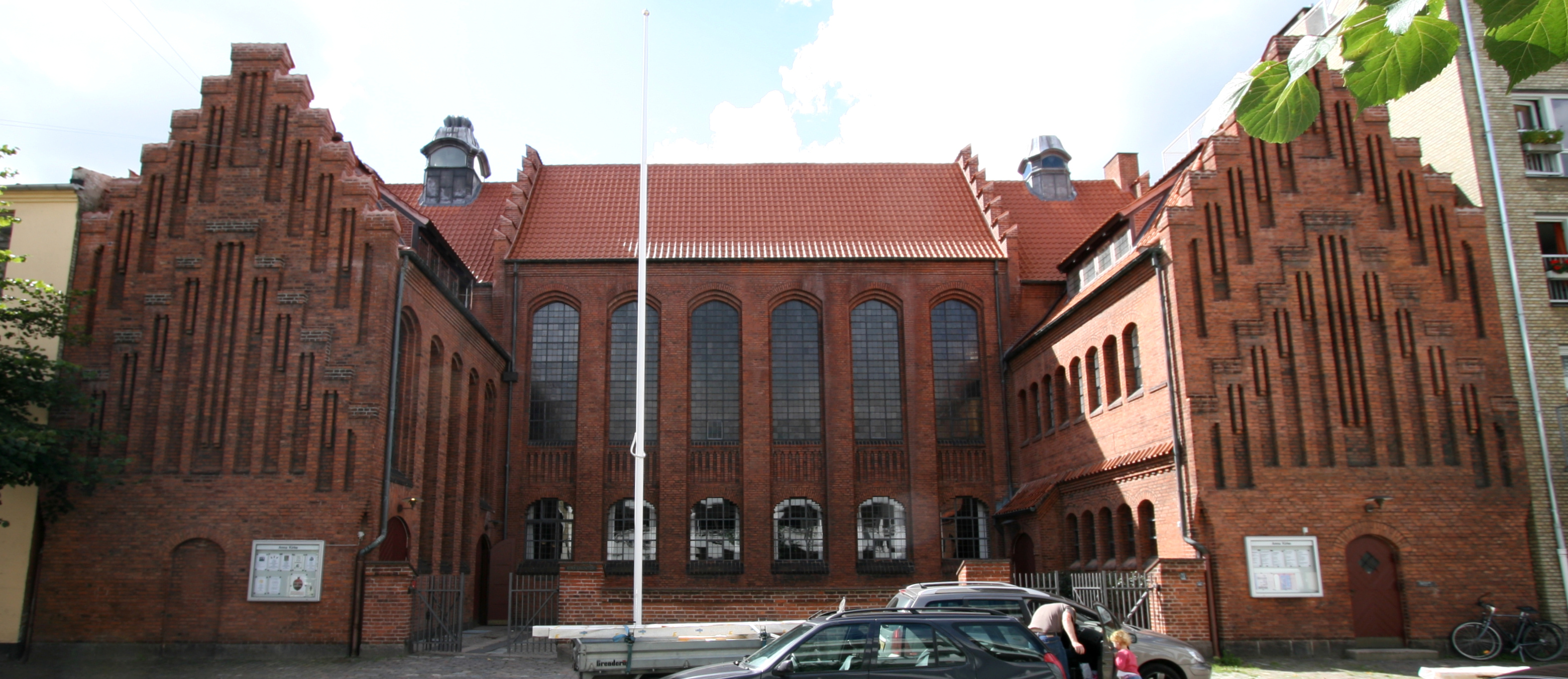 Anna Kirke in Copenhagen, Denmark.